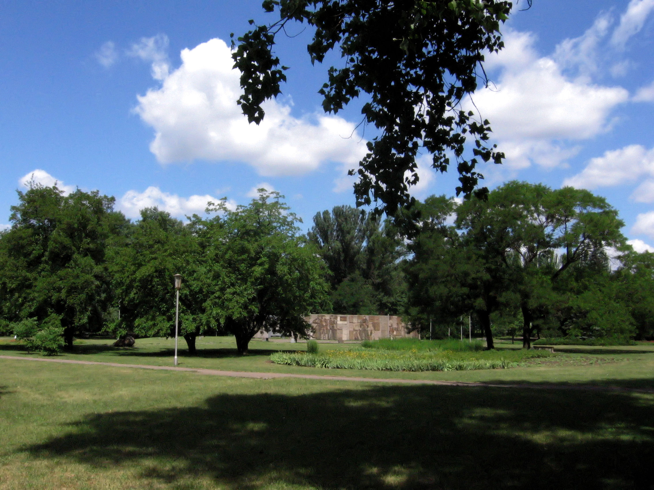 Стела Героїв